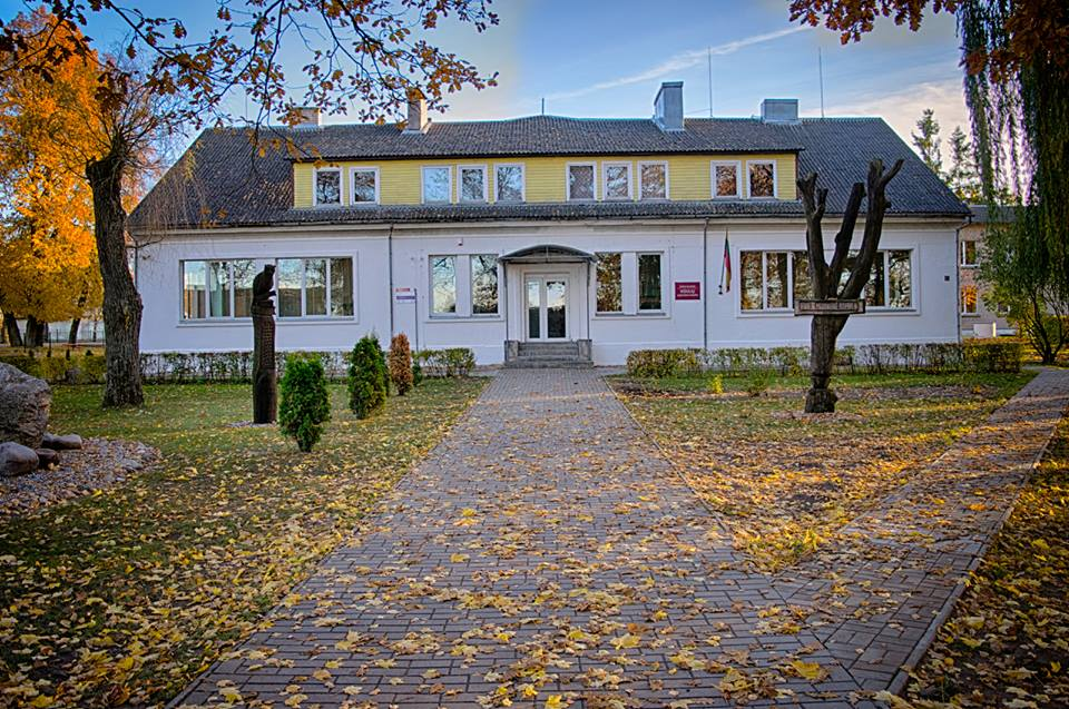 Kidulių pagrindinė mokykla rudenį